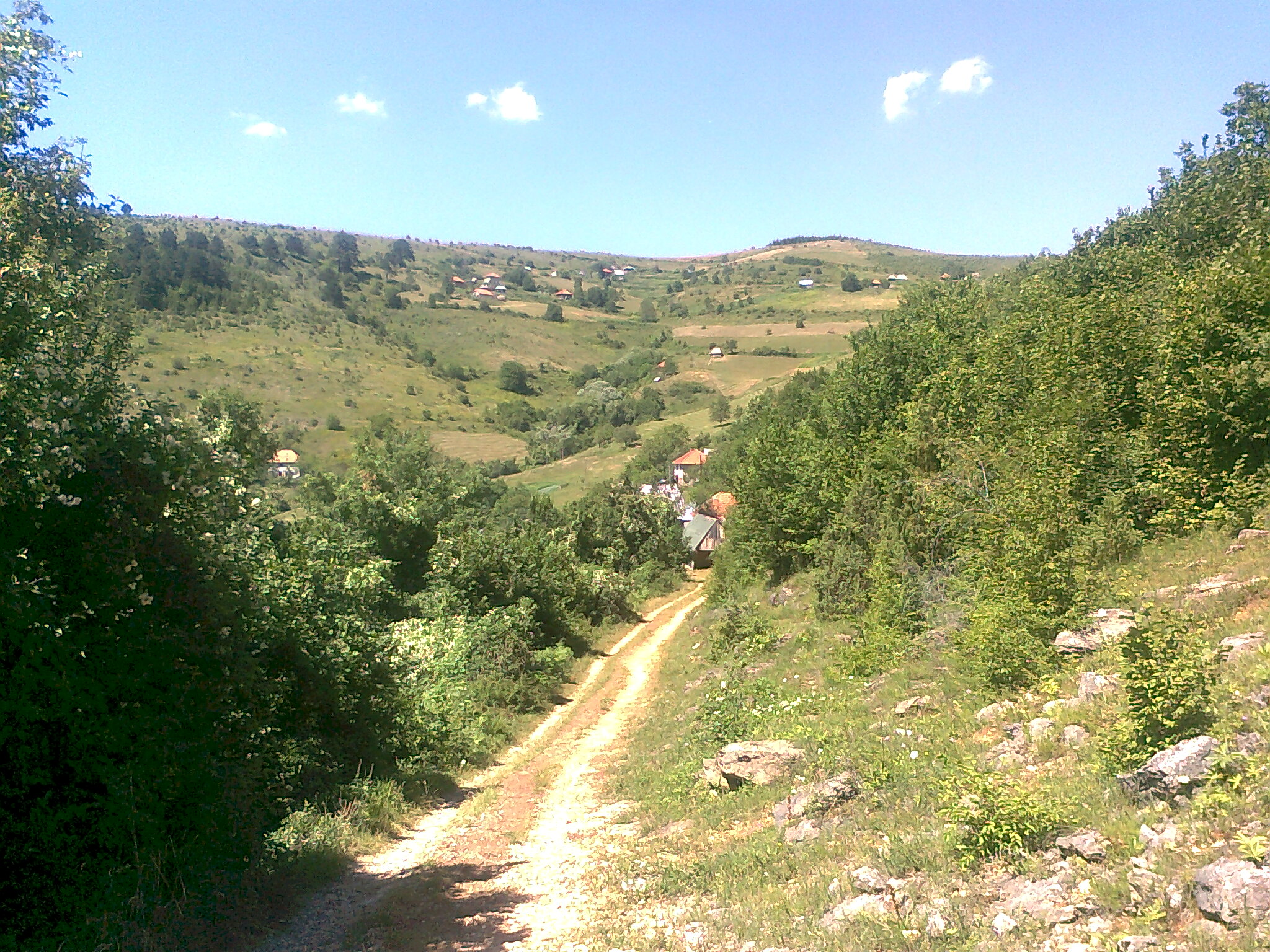 Фотографија је забележена 2010. године и приказује село посматрано са такозване Косе.